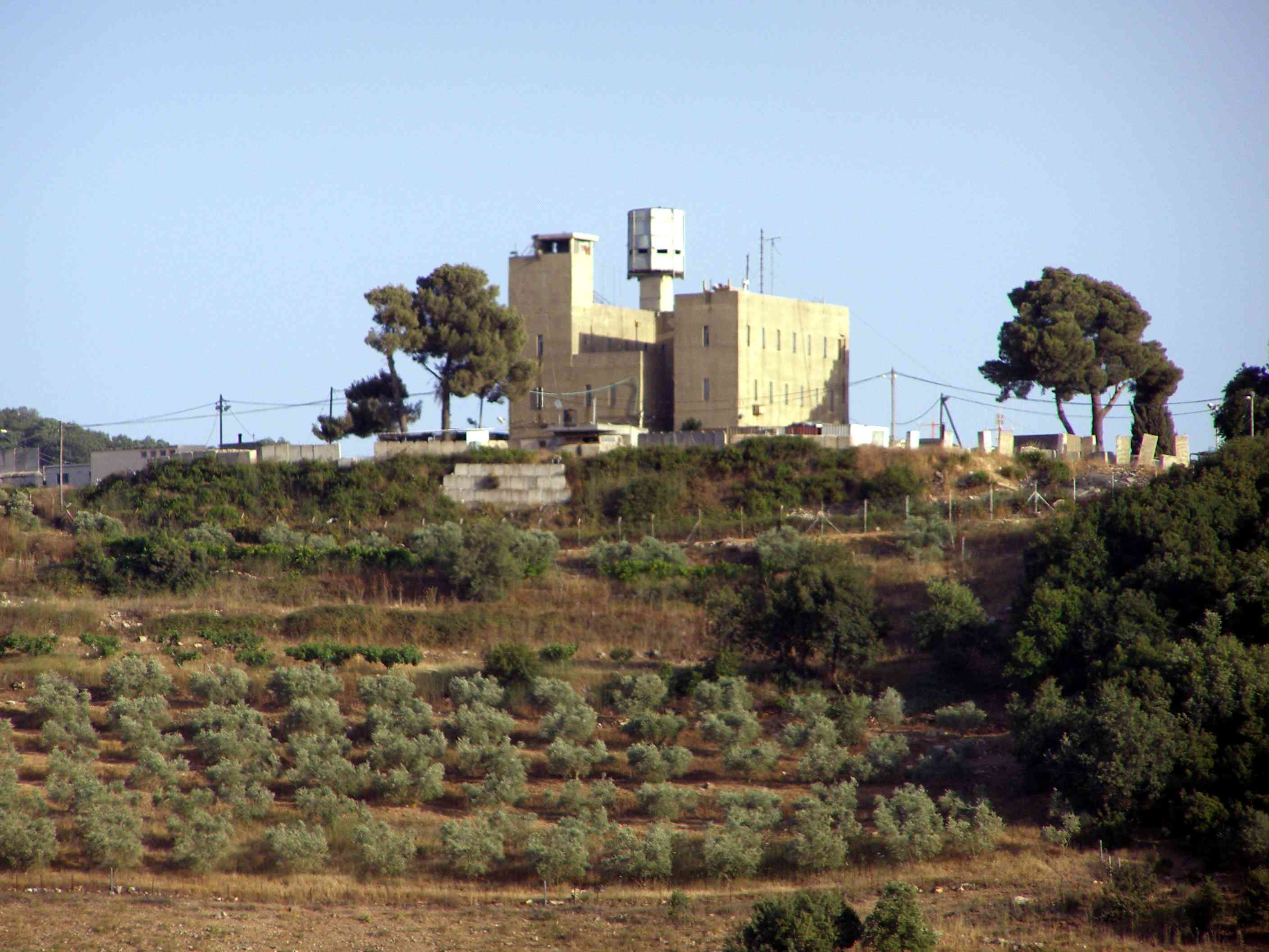 Sasa Tegart fort, Matat, Upper Galile, Israel